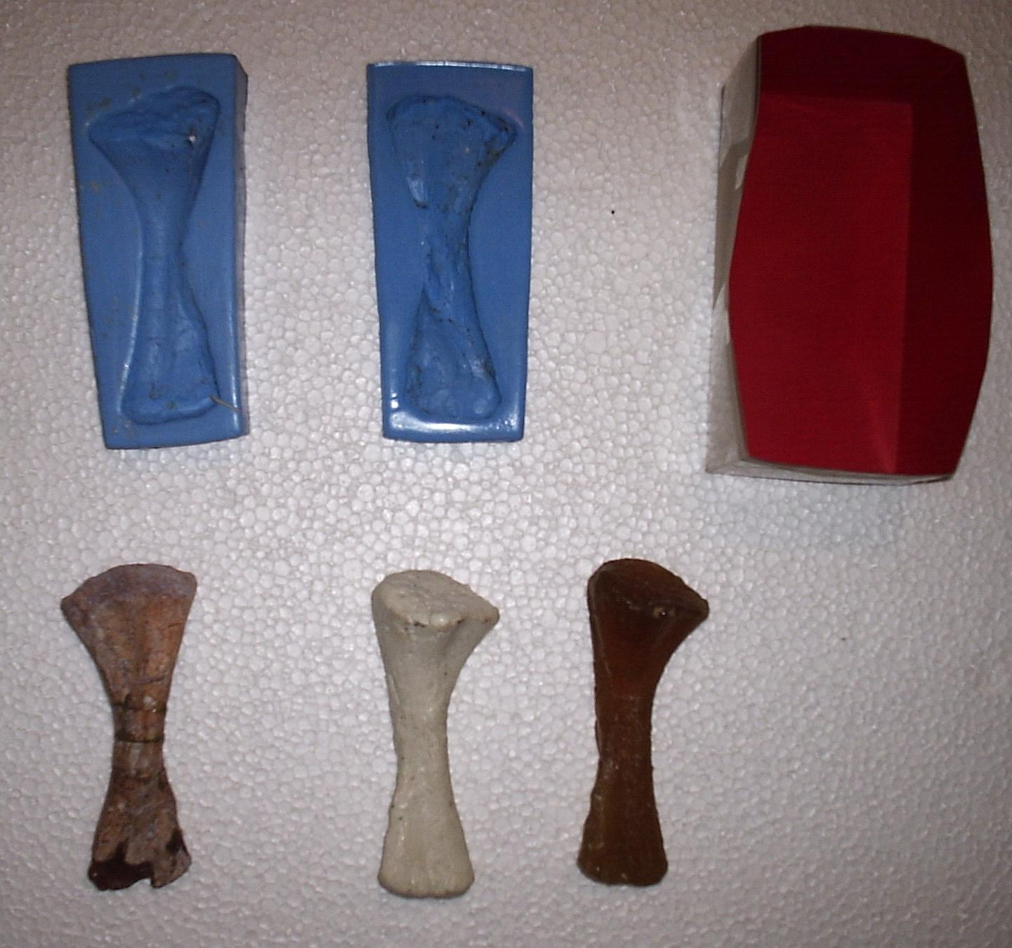 Molde de osso de rincossauro.